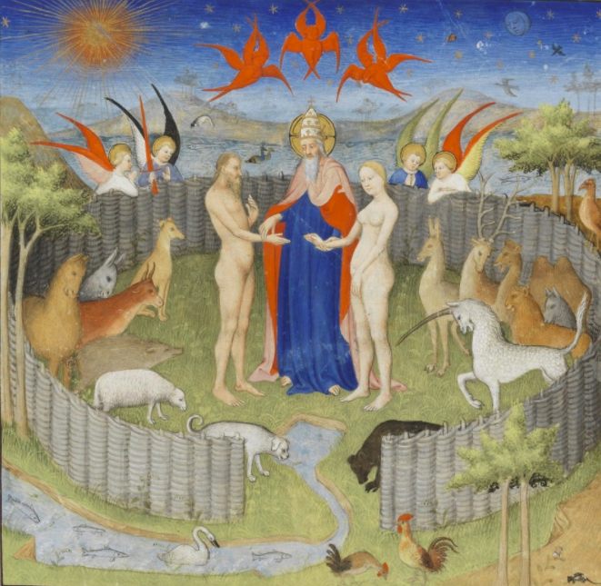 Dieu présentant Ève à Adam.